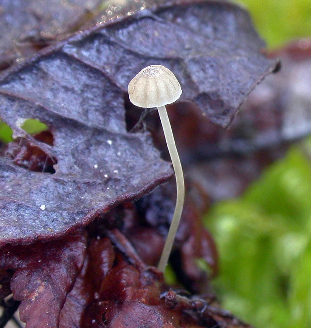 Sopparten grohette (Mycena guldeniana).